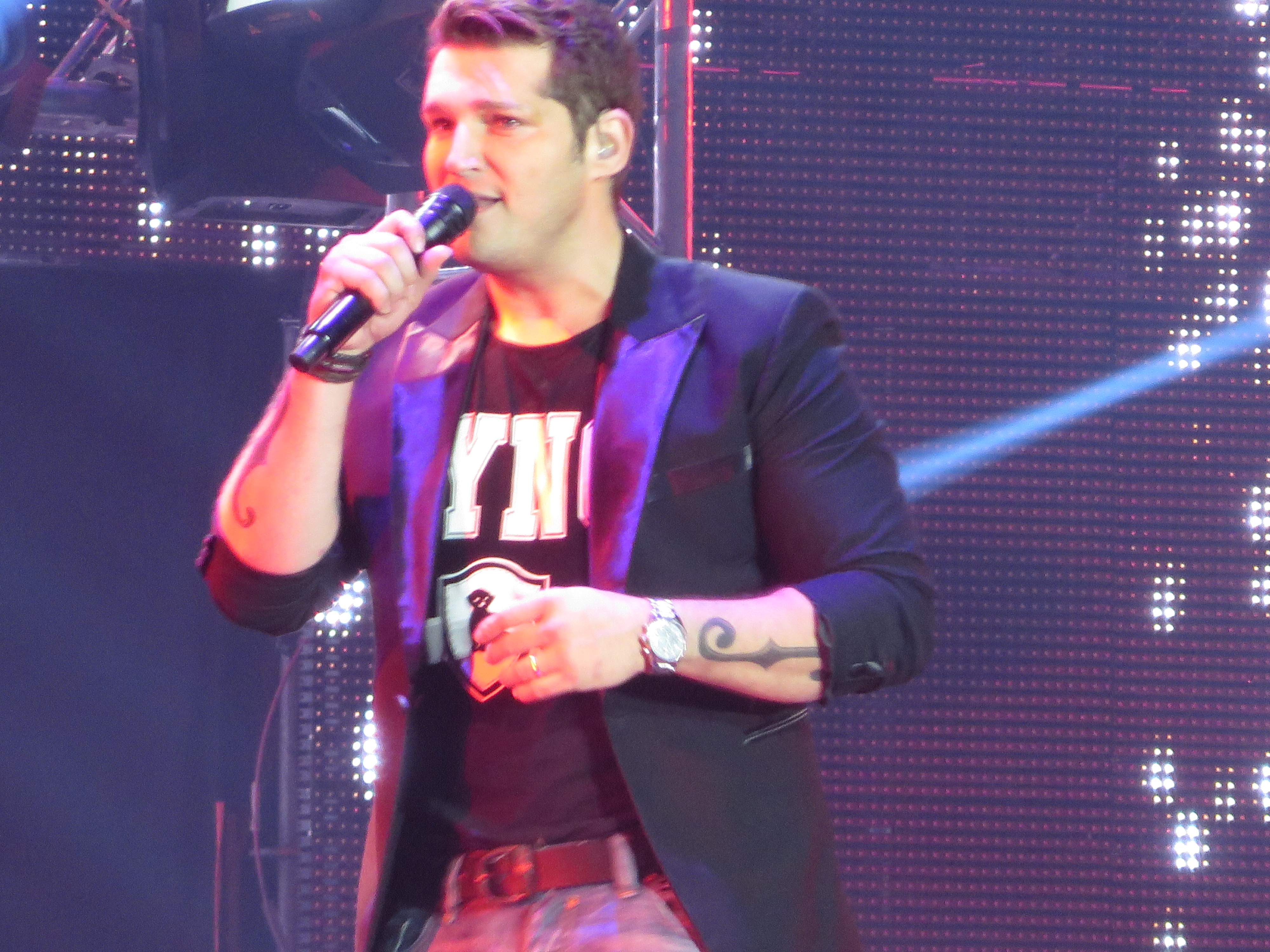 Actuación de Manu Tenorio en el concierto conmemorativo del 15 aniversario de OT en el Palau Sant Jordi de Barcelona (31-10-2016)